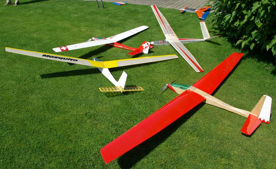 Frühe Elektroflugmodelle